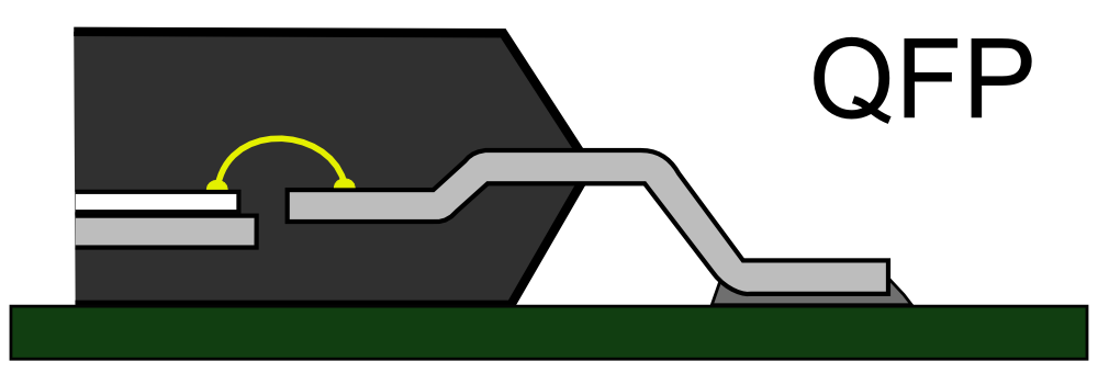 足部分の側面断面図. QFP 拡大断面図 四方に端子が伸びる.